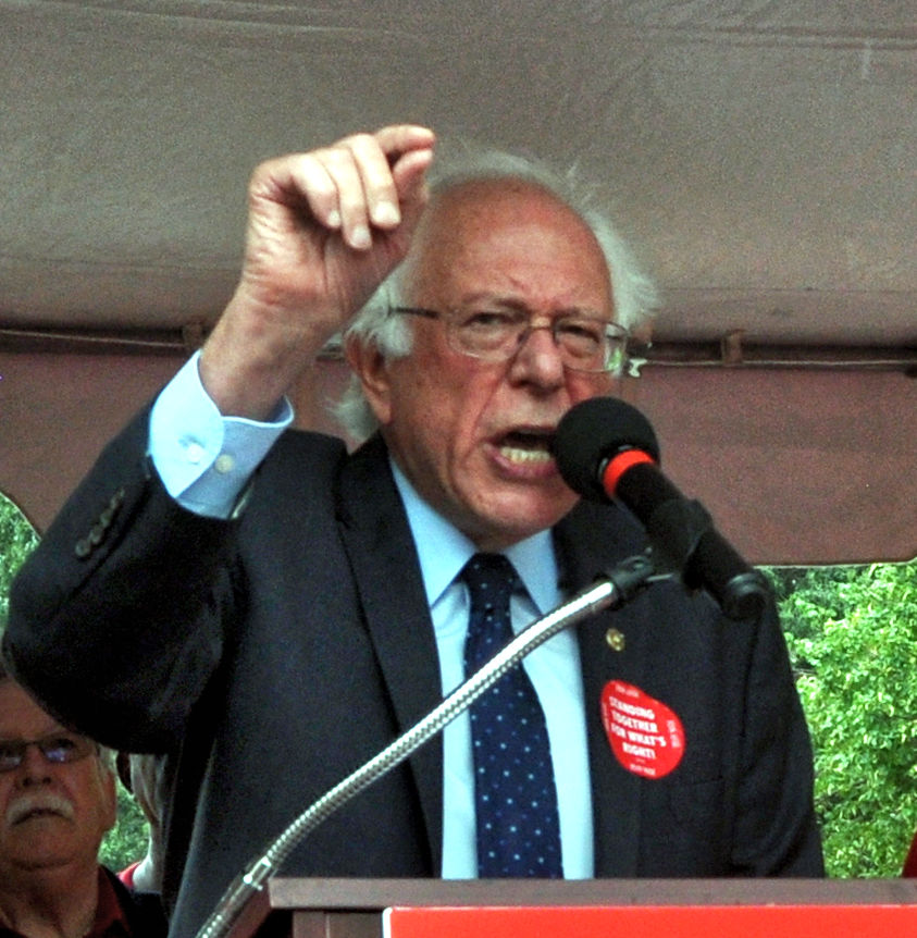 AFGE 0607